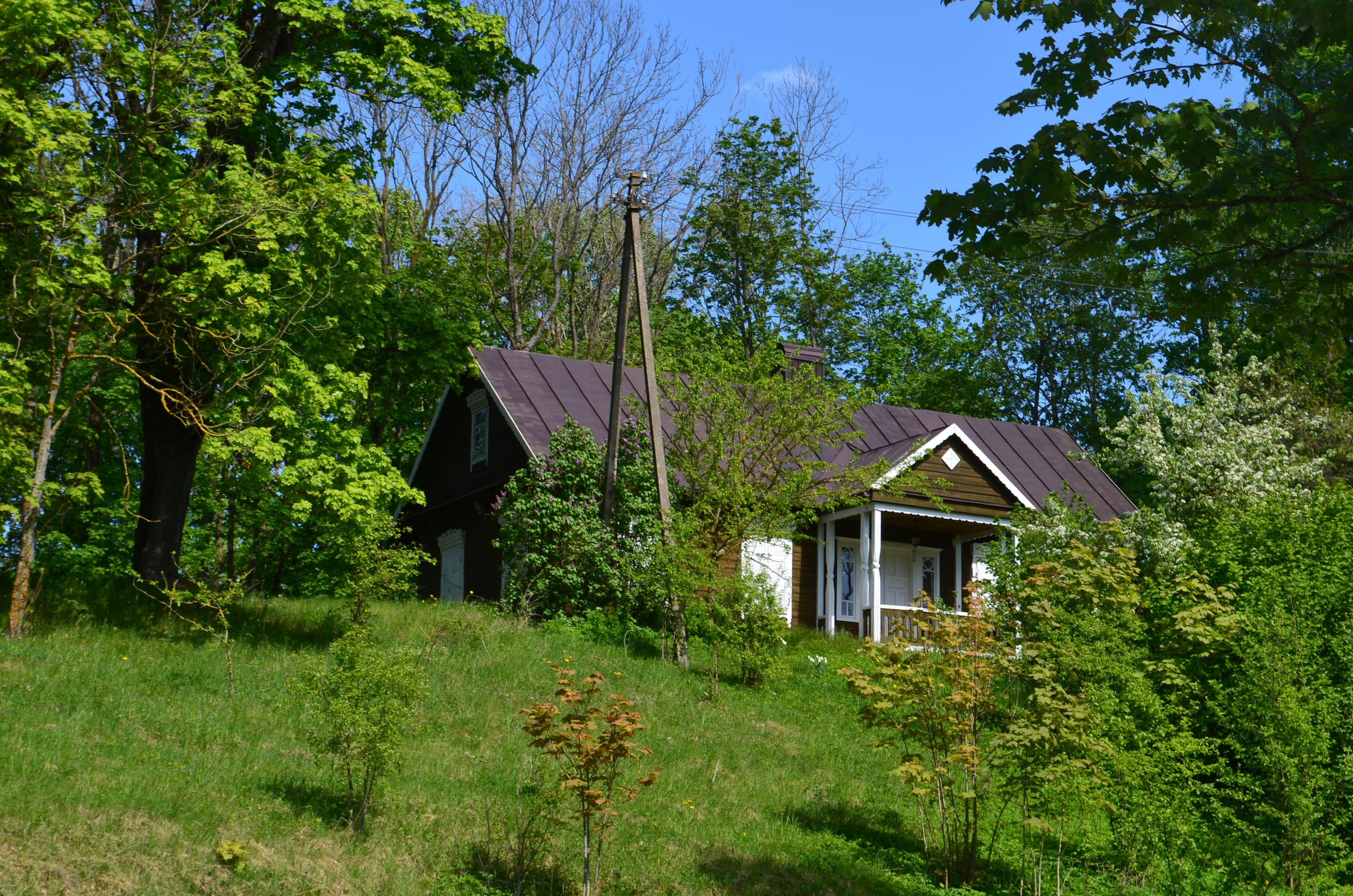 Antaplaštakis, Kurklių sen., Anykščių raj.